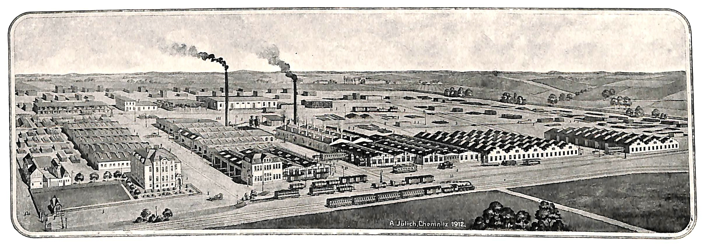 Werdau/Sachsen - (fiktive) Ansicht der Sächsischen Waggonbaufabrik AG